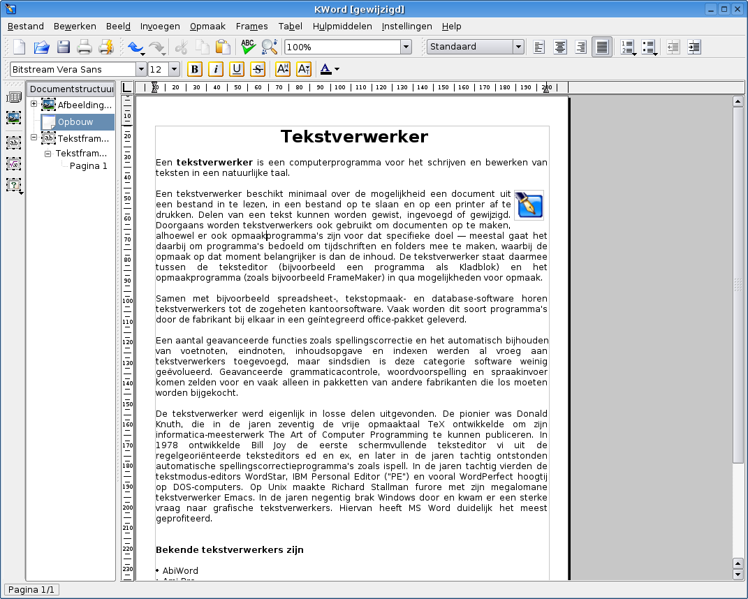 Zelfgemaakt screenshot van vrije toepassing